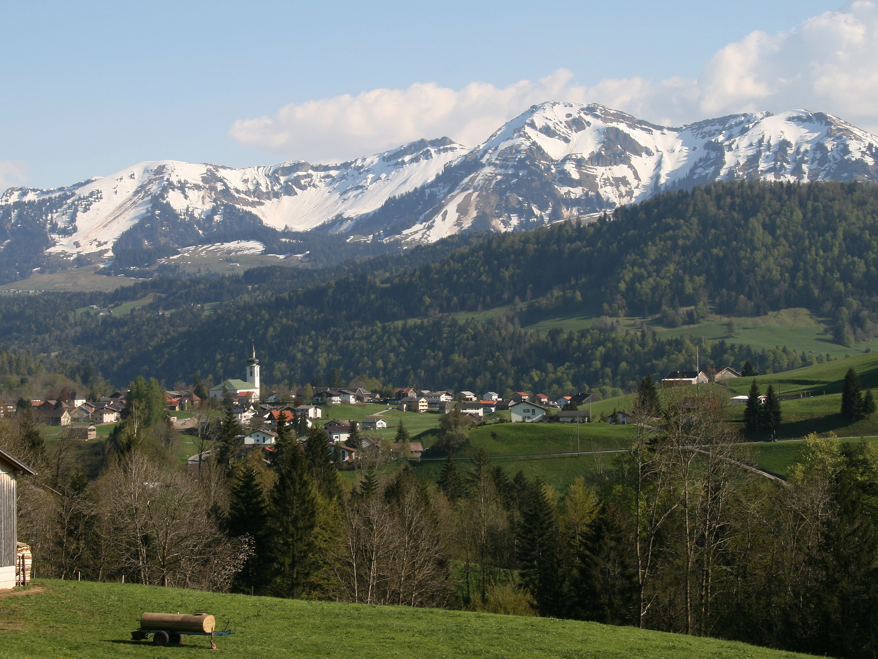 Blick vom Kurzentobel auf Hittisau in Vorarlberg.